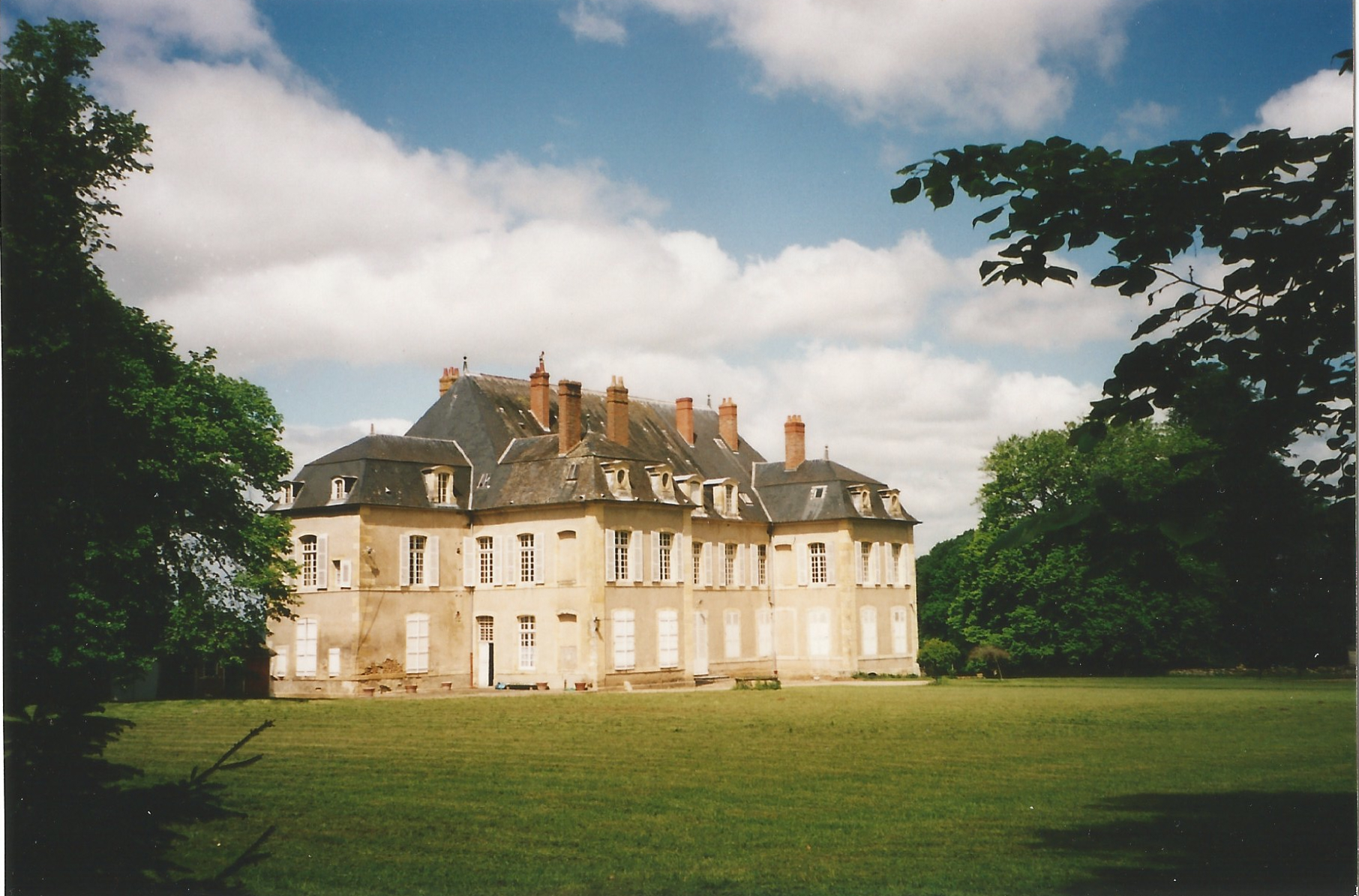 Ch de Sermoise vue SE